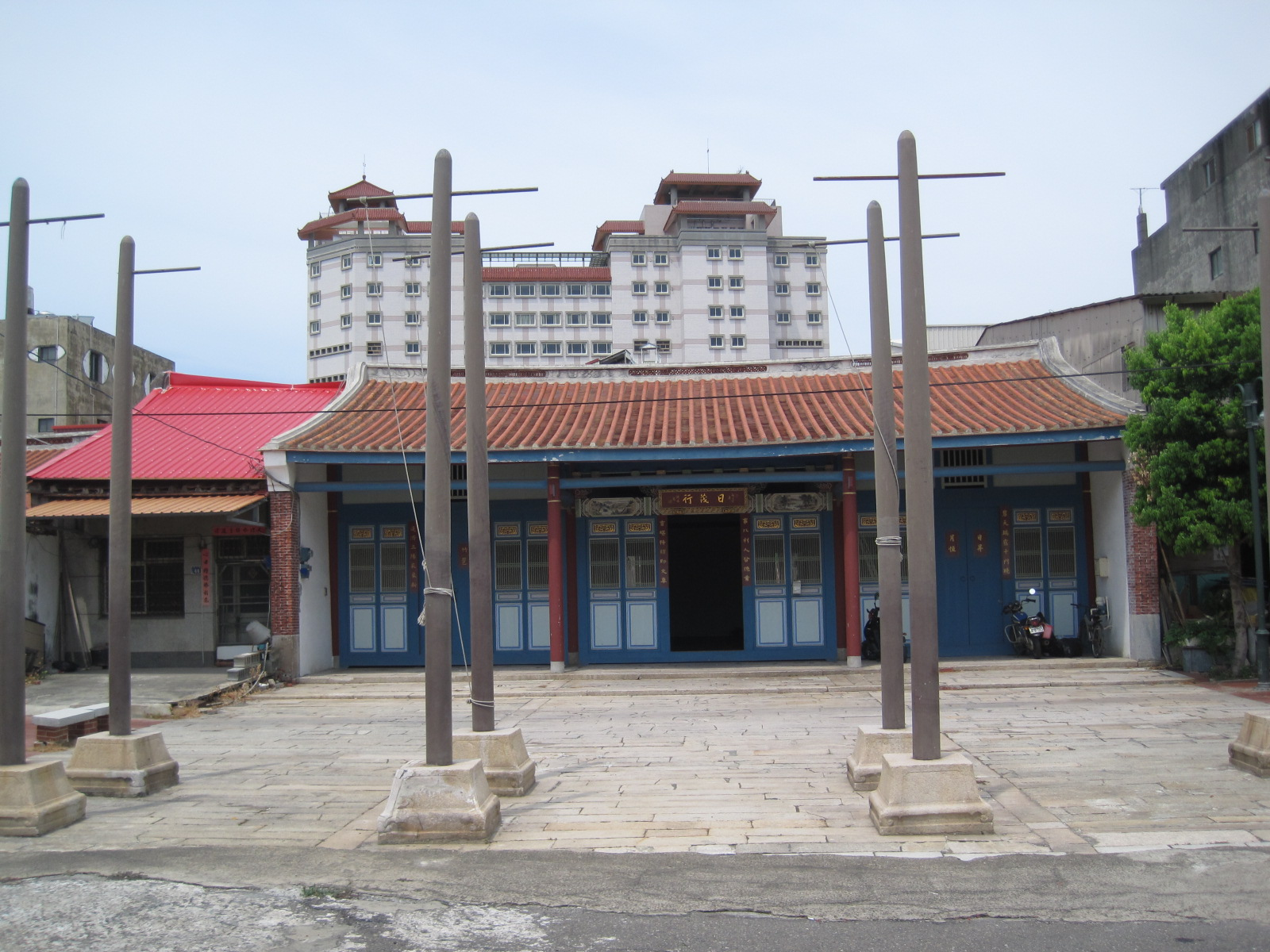 中文（台灣）: 日茂行日茂埕